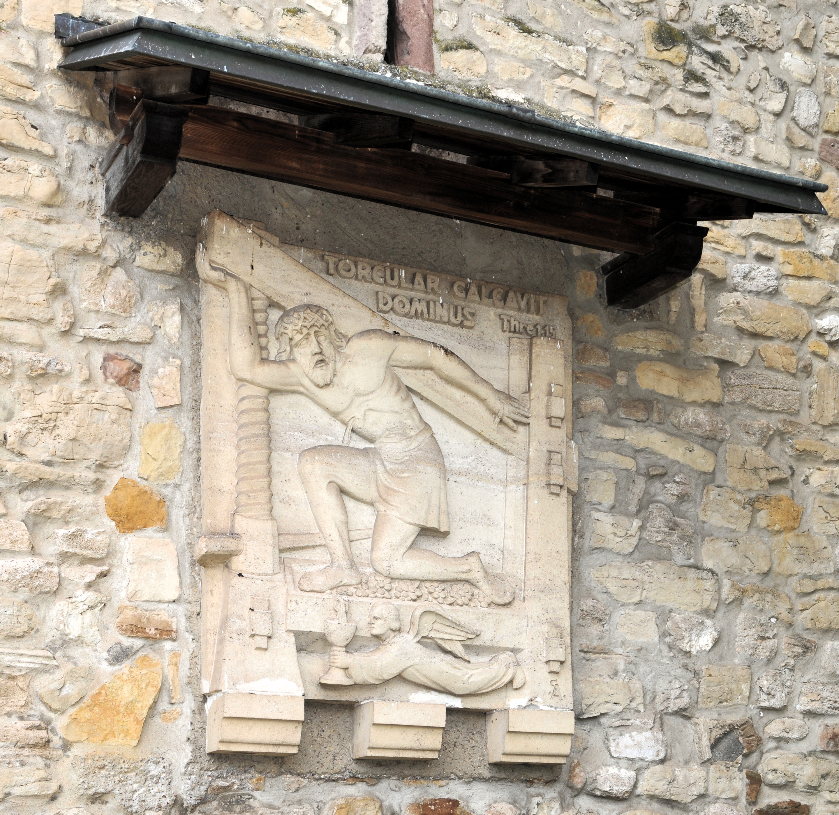 Torcular calcavit Dominus [virgini filiae Iuda]. De Relief "Christus dämmelt am Kelter" vum Aurelio Sabbatini gouf 1957 baussen um 'alen' Tuerm vun der Schwéidsbenger Kierch installéiert. D'Skulptur ass do ubruecht wou fréier d'Missiounskräiz houng, dat lo bannen an der Kierch hängt.